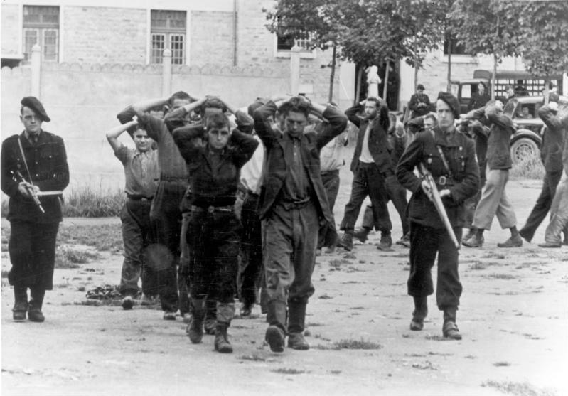 Note: This description has been identified as biased or incorrect: Original Nazi propaganda description. Der rote Maquis in Frankreich Bei einer Aktion gegen die Terroristen in Frankreich wurden zahlreiche Gefangene eingebracht. Unter ihnen befinden sich viele verbrecherische Naturen, die Morde, Raubüberfälle, Eisenbahnattentate usw. auf dem Gewissen haben. Die werden bewacht von Angehörigen der franz. Miliz, die Schulter an Schulter mit deutschen Soldaten gegen den Bolschewismus kämpfen. Foto: Kriegsberichter Koll